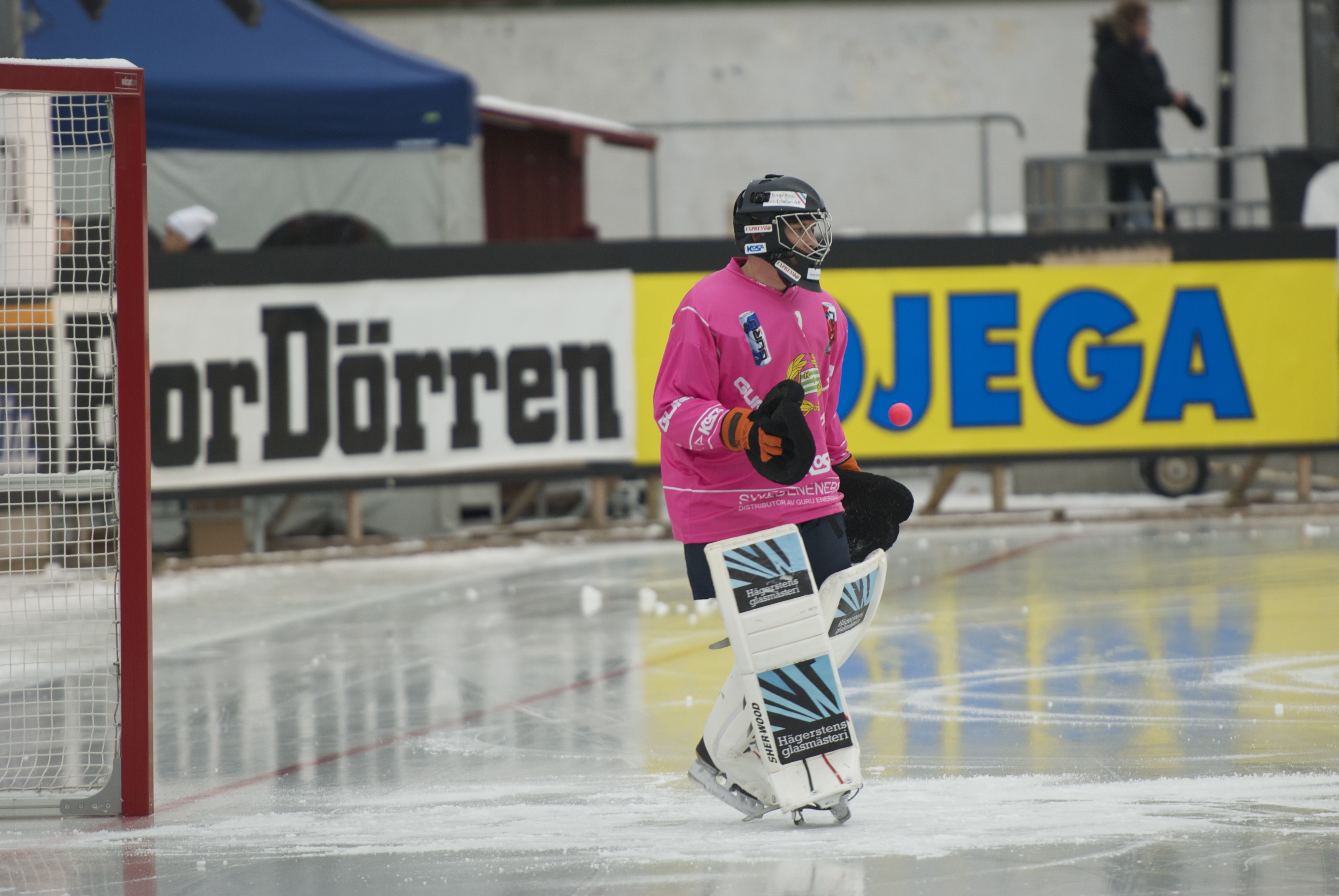 Emil Paulin Ström, Hammarby Bandy. Bandy match between Hammarby (Green) and GAIS (White) in Elitserien, Zinkendamms IP (Stockholm) 2012-02-11.